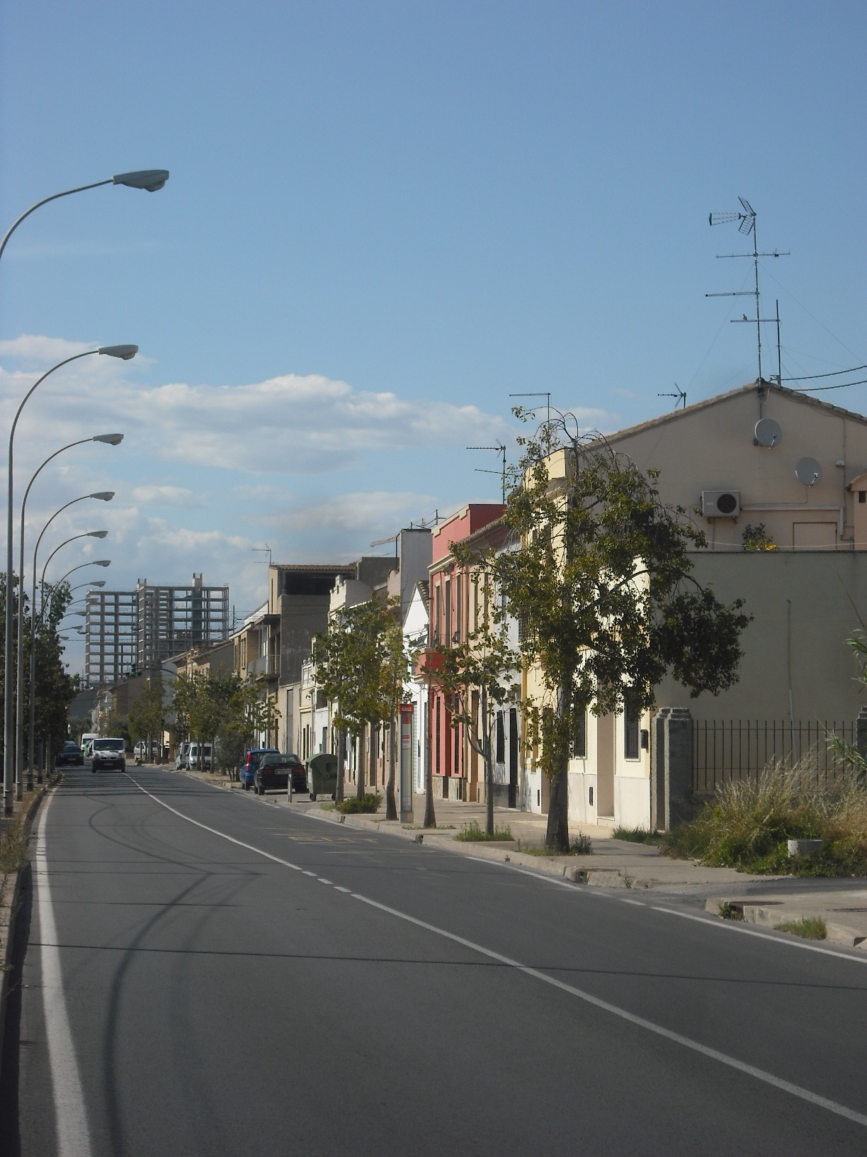 Carrera de la Font d'En Corts cap al nord.